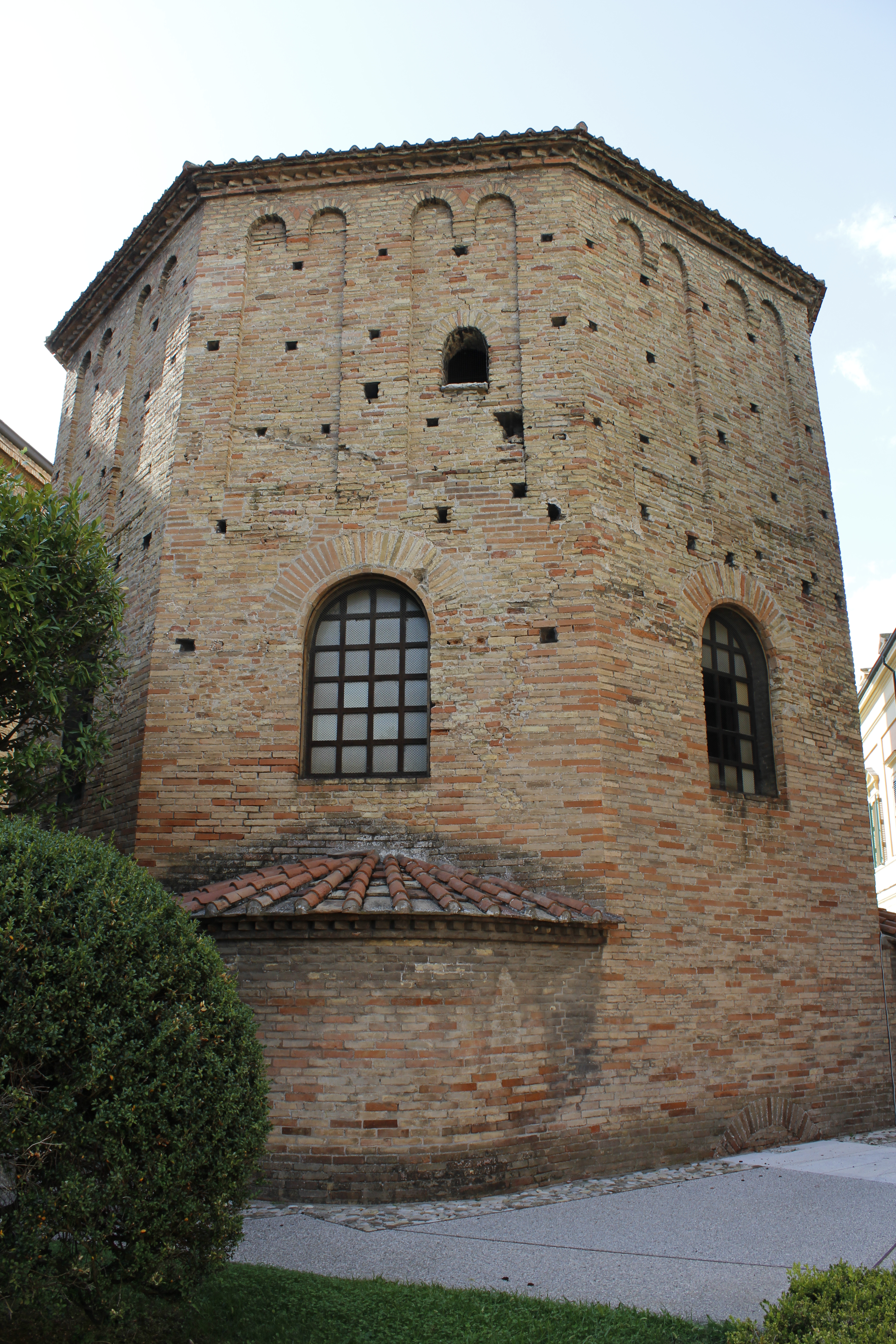 Battistero Neoniano, Ravenna